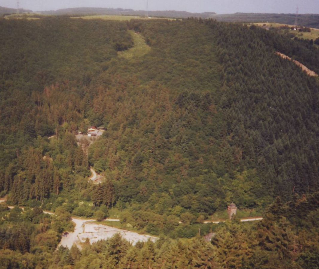 Besucherbergwerk Fell